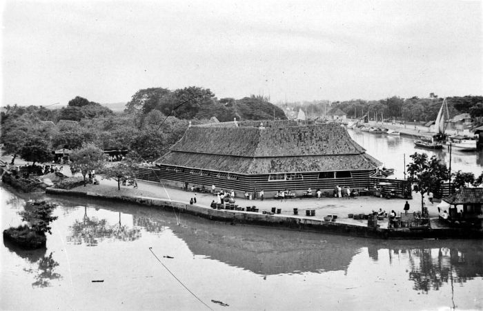 Repronegatief. Het kanaal achter de visveiling 'Pasar Ikan' te Jakarta, Java